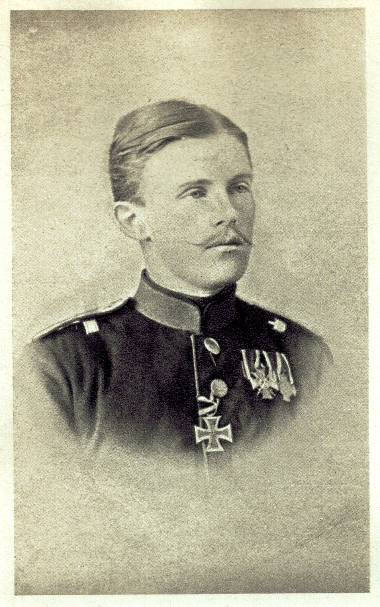 Detlev von Liliencron im Alter von 27 Jahren